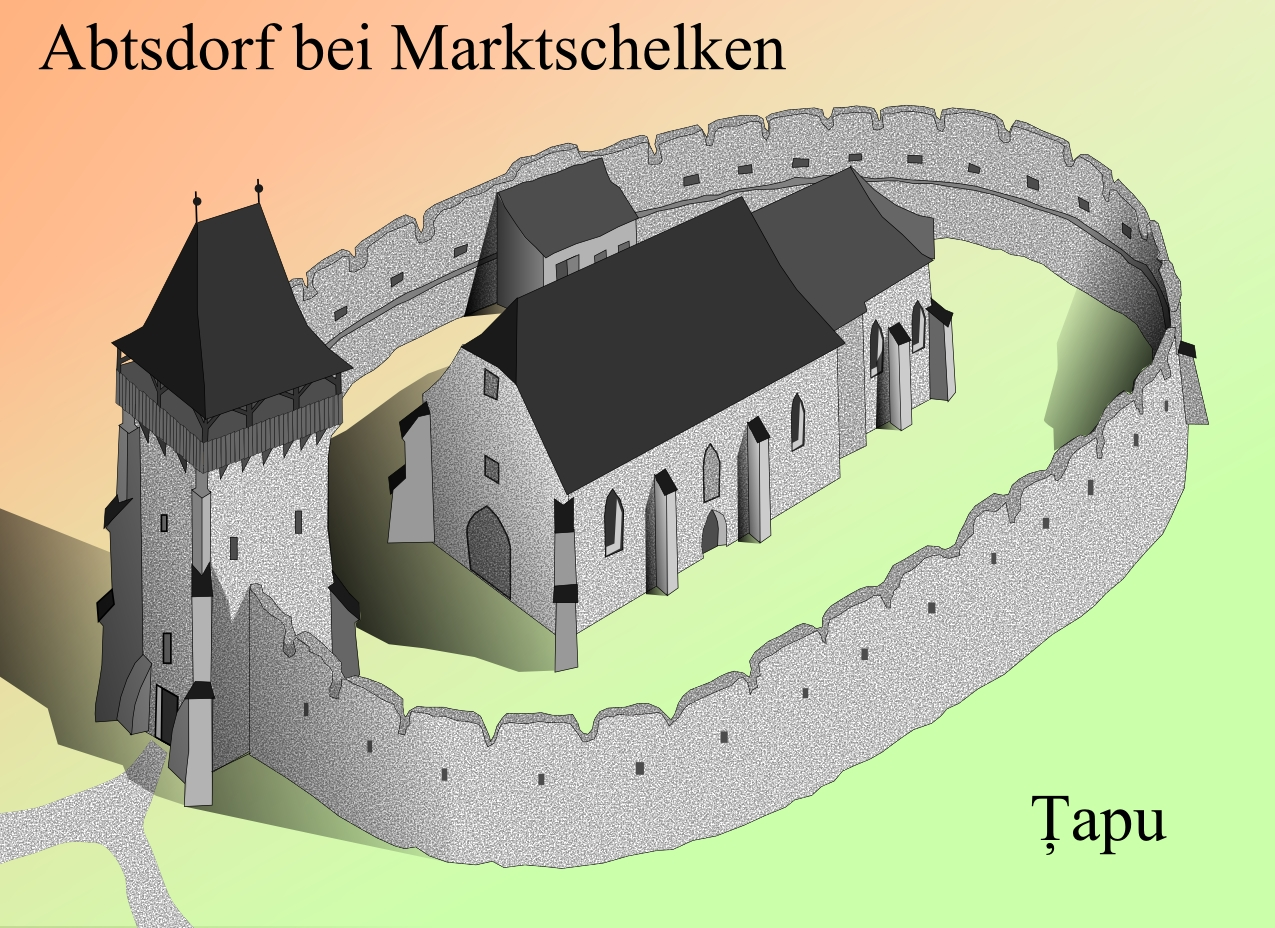 Biserica fortificata din Tapu